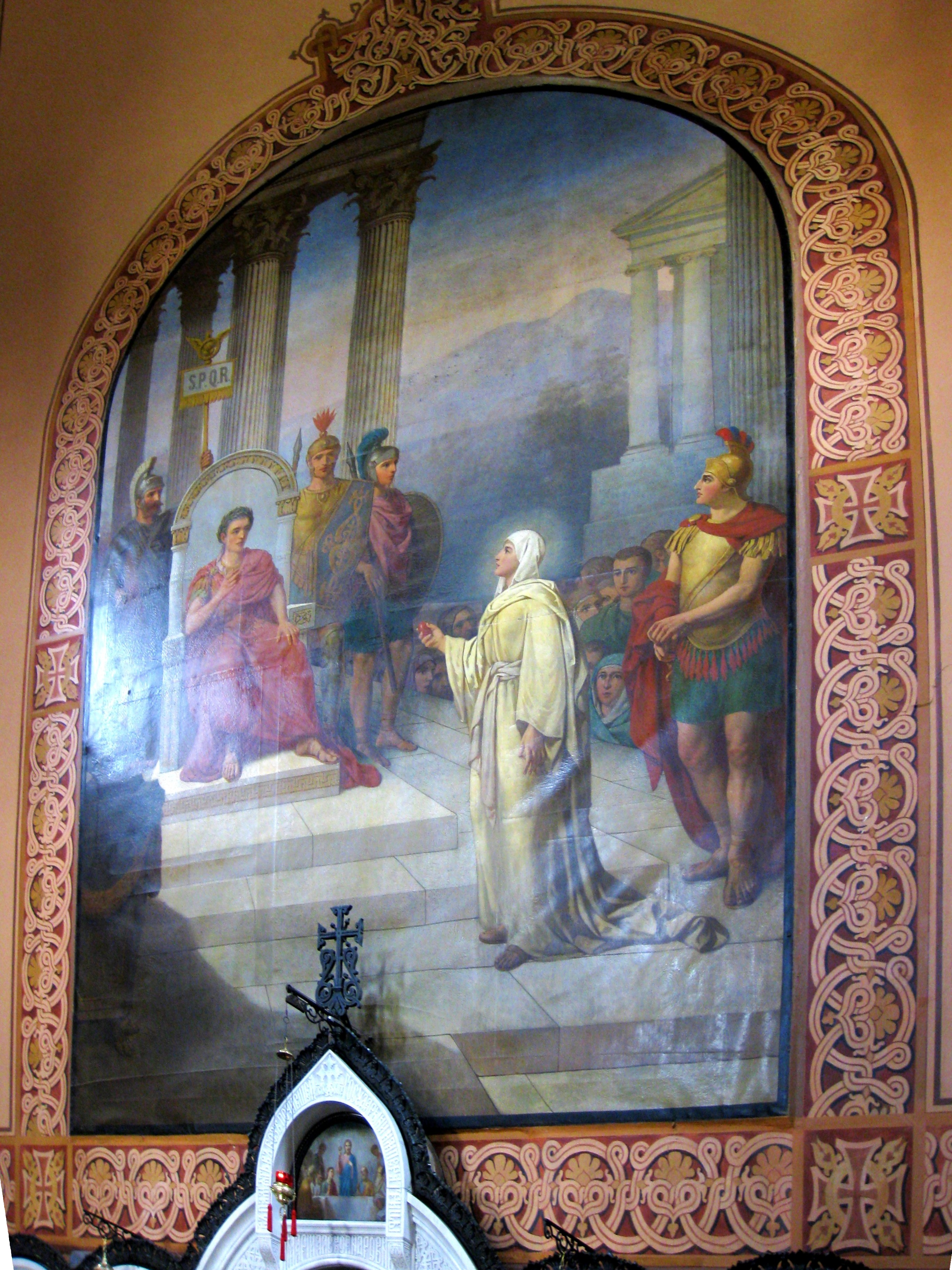 Church of Saint Mary Magdalene כנסיית מריה מגדלנה (כנסיית הבצלים)